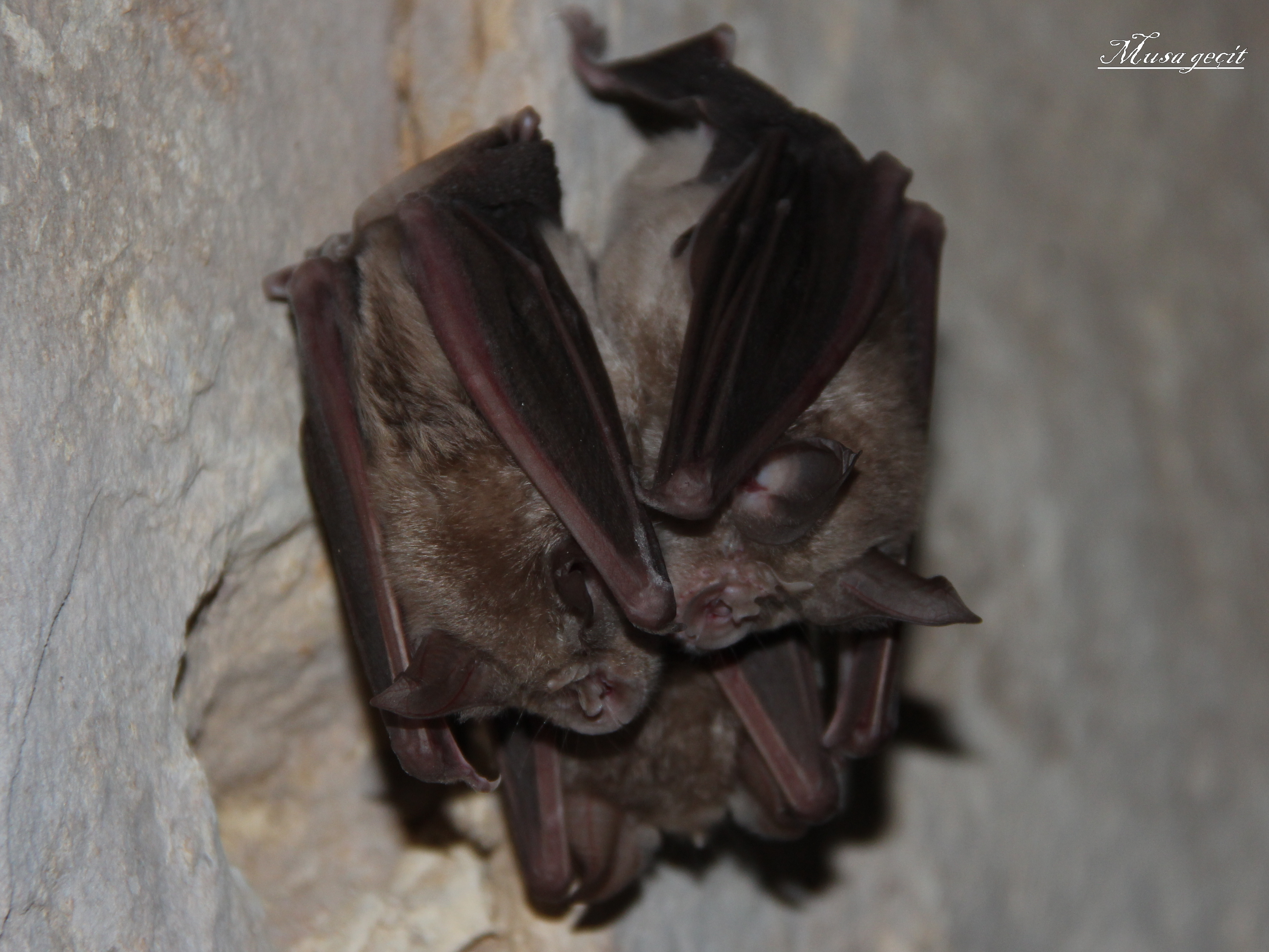 Yer: Mardin Büyük Nalburunlu Yarasa